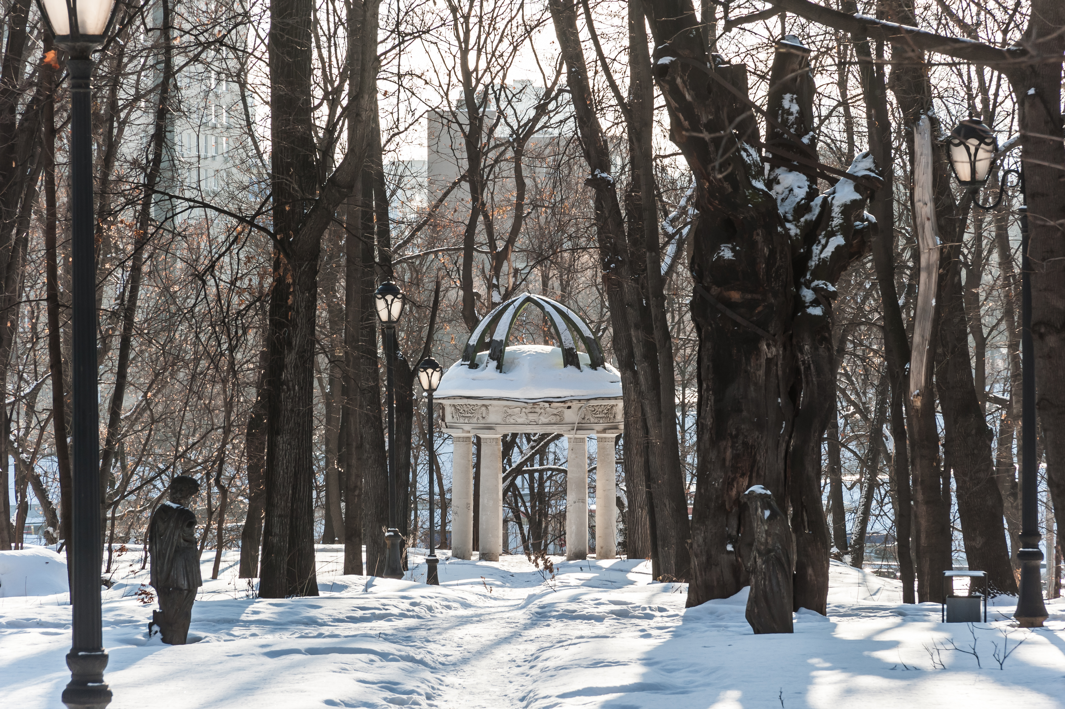 Москва. Земляной вал, 53